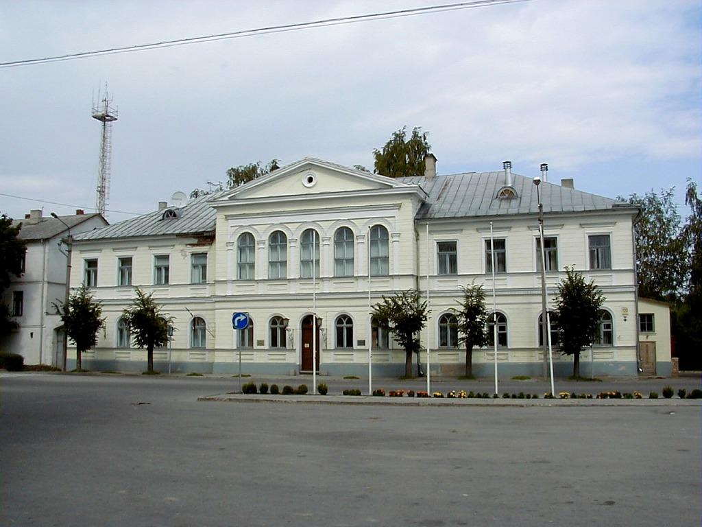 Jēkabpils pilsētas dome 2000-07-23